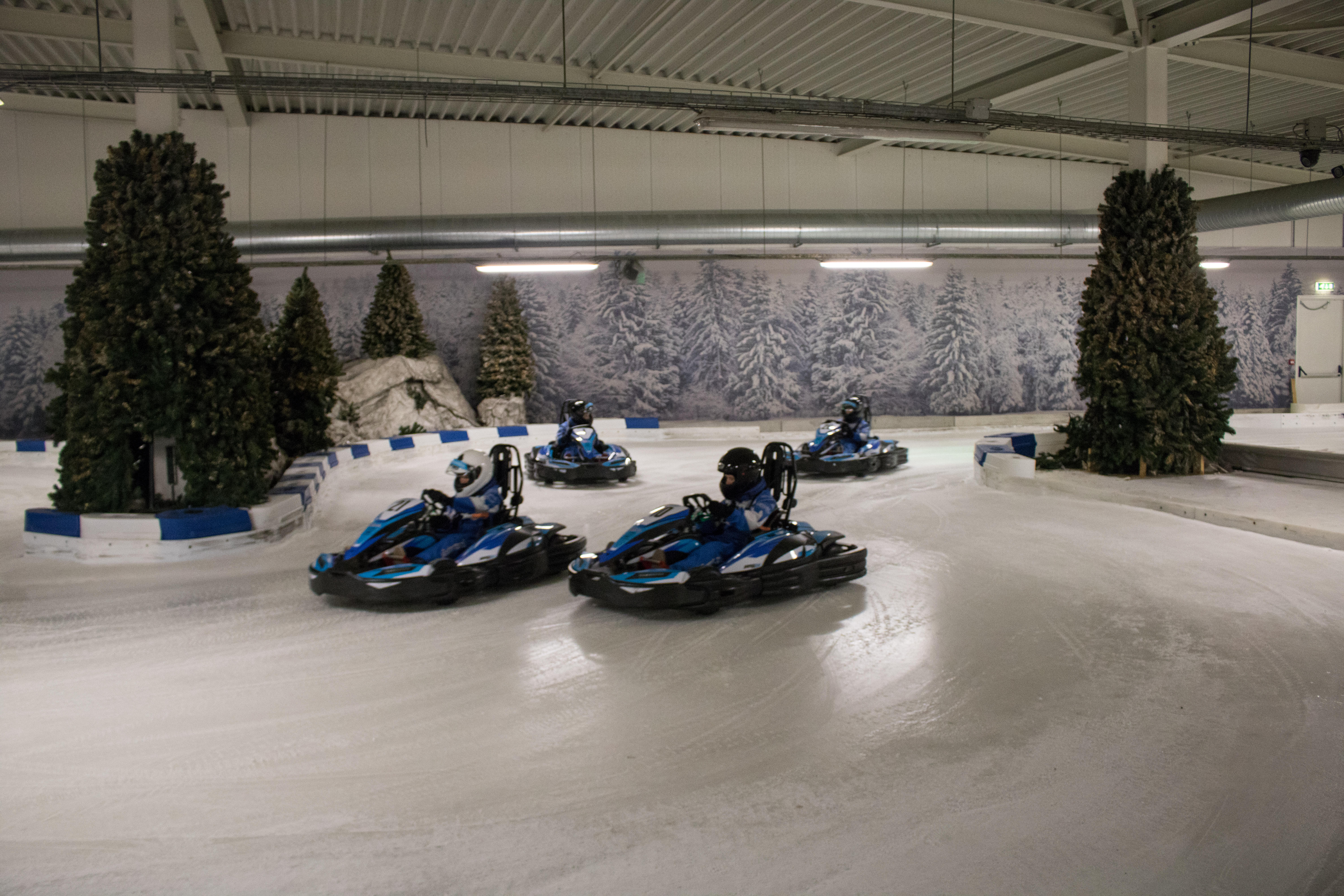 Het karten op ijs is mogelijk in de speciale karts met spikebanden.